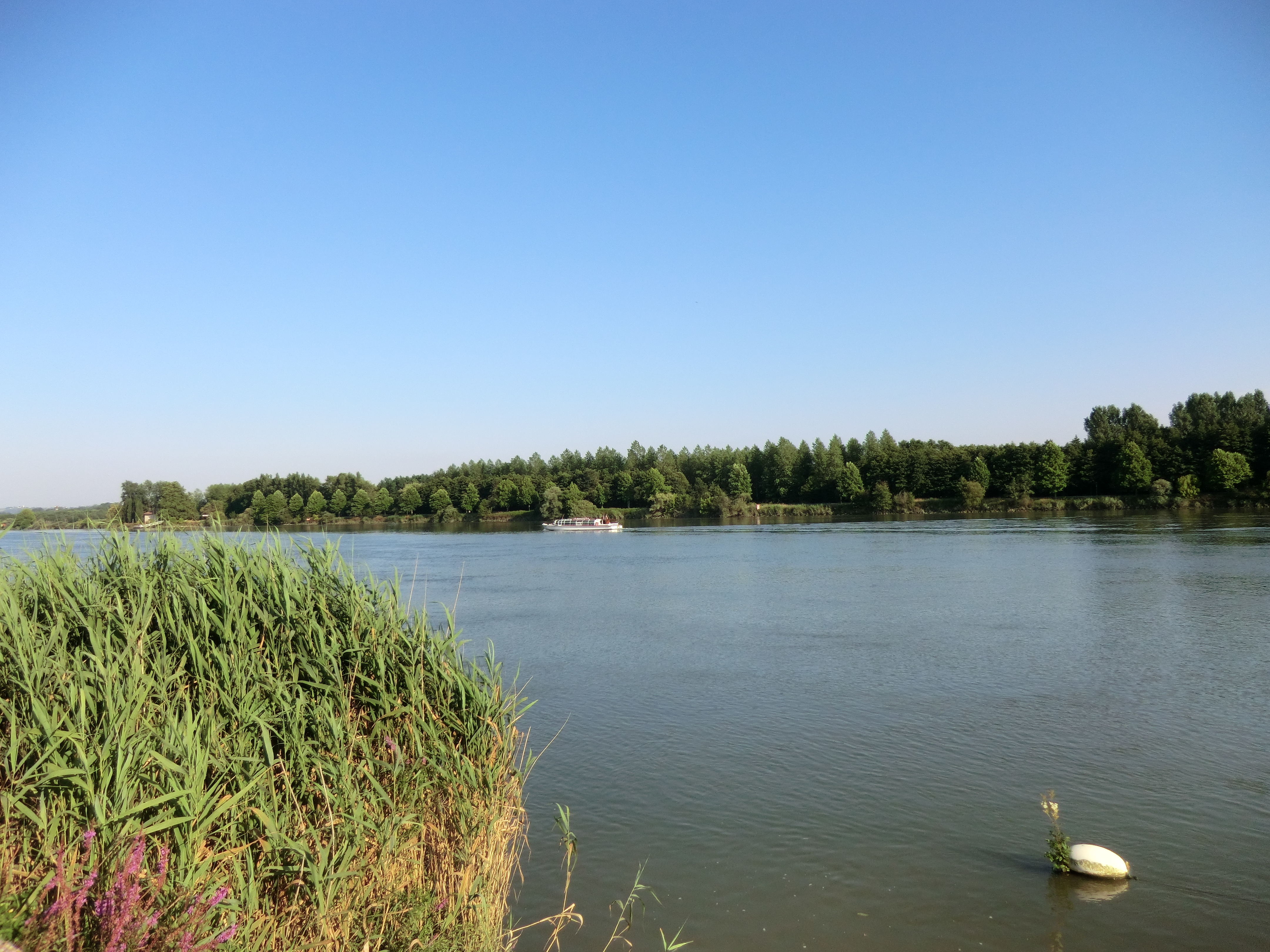 L'Adour à Saint-Martin-de-Seignanx en juillet 2012.